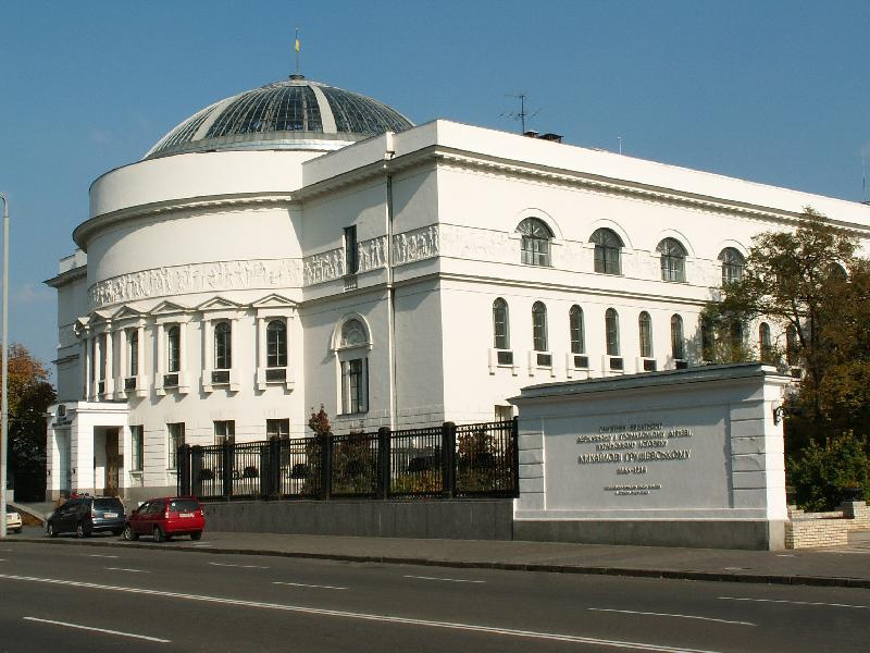 Культурный Центр Кияночка